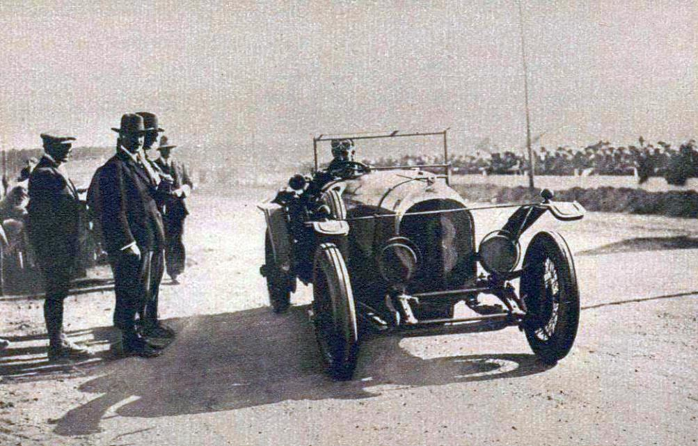 La voiture victorieuse de Duff et Clément franchit la ligne d'arrivée des 24 heures du Mans 1924.